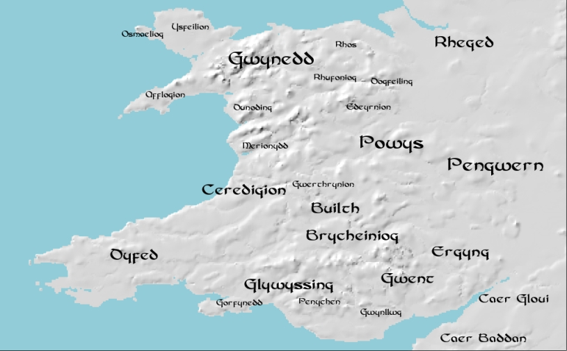 rouantelezhioù kozh kembre